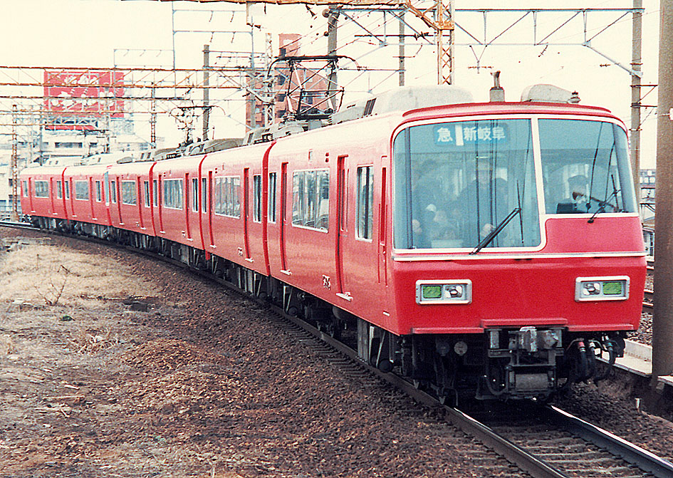 名古屋鉄道 5700系 4両編成+5300系 2両編成